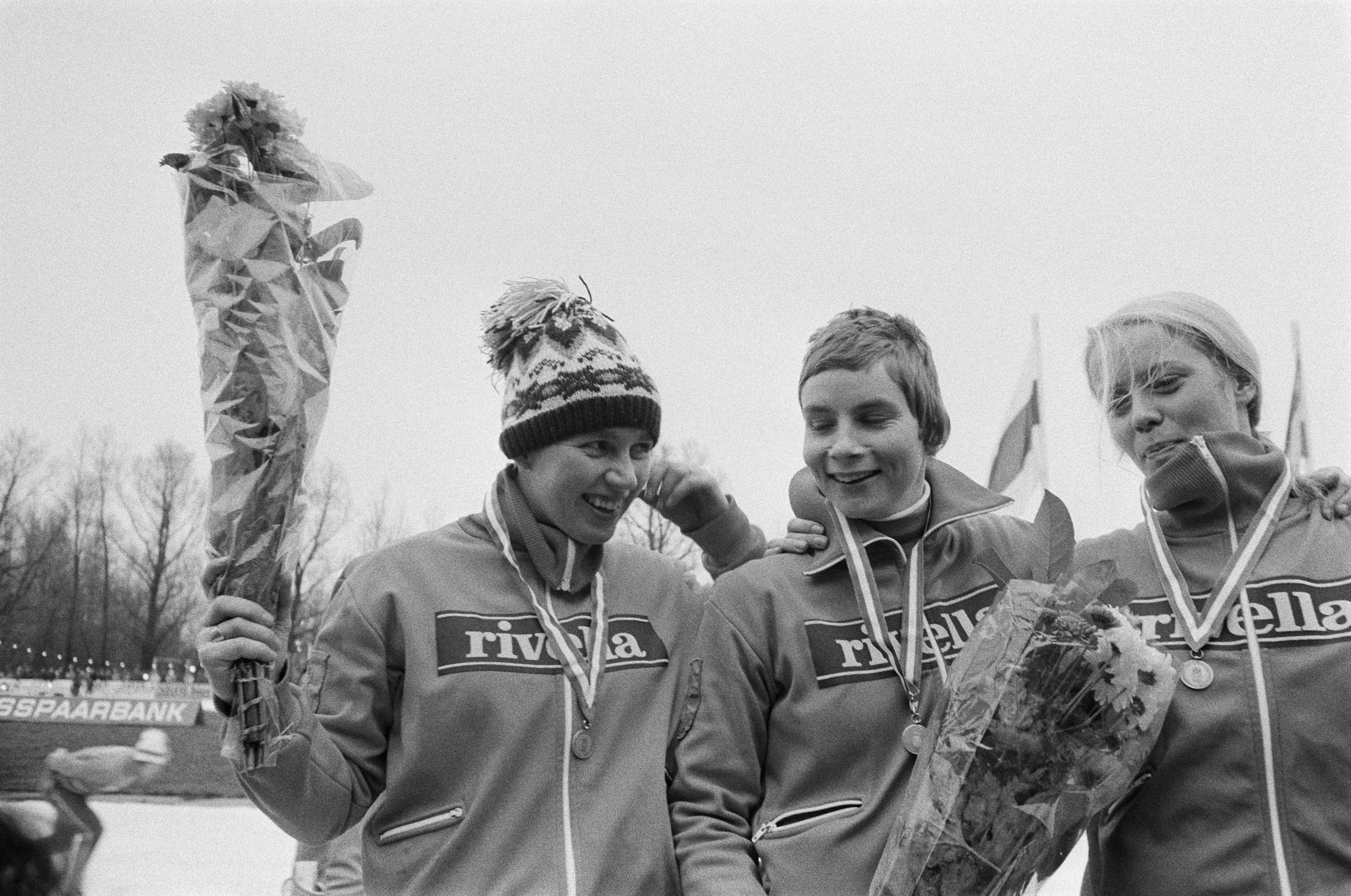 Collectie / Archief : Fotocollectie Anefo Reportage / Serie : [ onbekend ] Beschrijving : Nederlandse kampioenschappen schaatsen in Groningen; huldiging 500 meter v.l.n.r. Margriet Pompe, Haitske Pijlman en Ina Steenbruggen. Datum : 10 januari 1976 Locatie : Groningen Trefwoorden : schaatsen, sport Persoonsnaam : Pijlman, Haitske, Pompe, Margriet, Steenbruggen, Ina Fotograaf : Verhoeff, Bert / Anefo Auteursrechthebbende : Nationaal Archief Materiaalsoort : Negatief (zwart/wit) Nummer archiefinventaris : bekijk toegang 2.24.01.05 Bestanddeelnummer : 928-3554